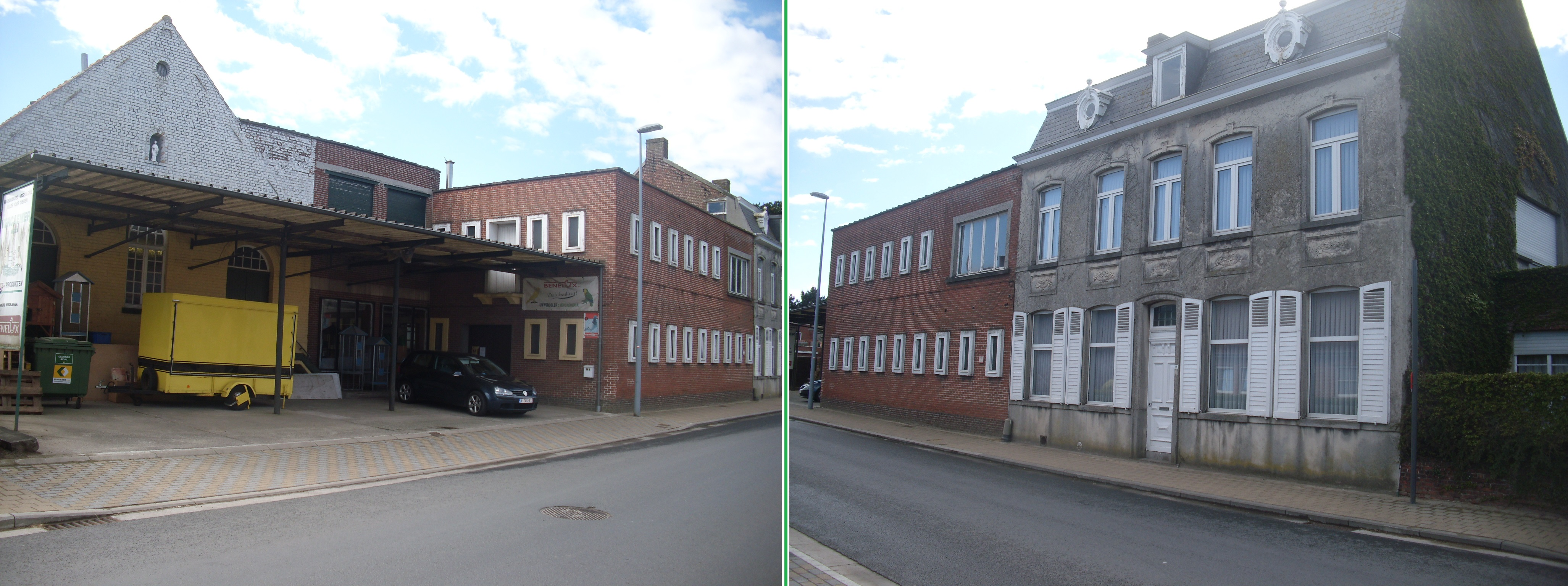 Voormalig Zuivelfabriek Sint-Macharius - Dentergemstraat - Wontergem - Deinze - Oost-Vlaanderen - België